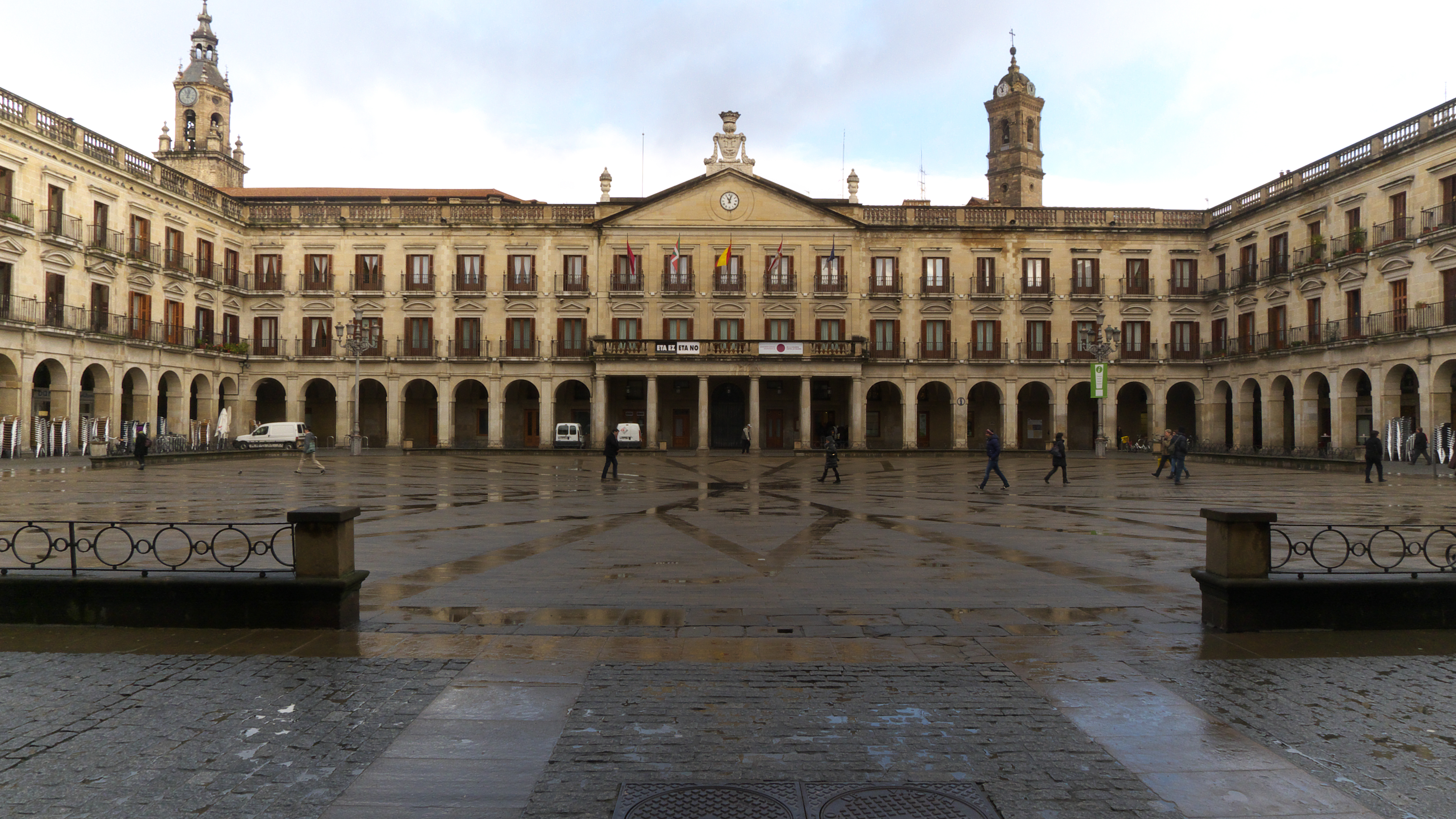 Neoclásico de Justo Antonio de Olaguibel Quintana (1781)